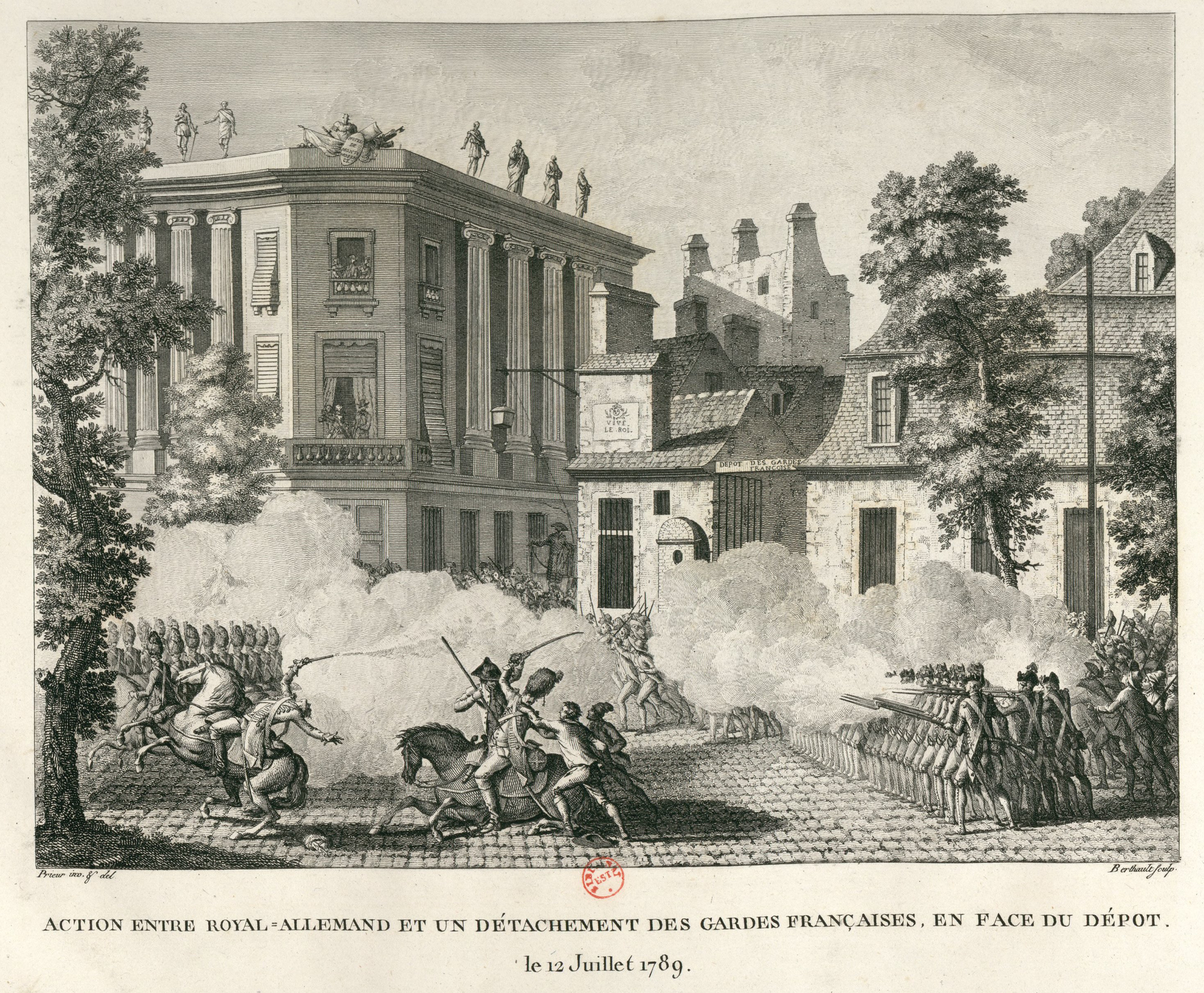 Action entre le régiment Royal-Allemand commandé par le prince le Lambesc et un détachement des Gardes françaises, devant leur dépot, à l'angle du Boulevard et de la rue de la Chaussée d'Antin, dans la nuit du 12 juillet 1789 : [estampe] / Prieur inv. & del. ; Berthault sculp. ; [eau-forte par Duplessi-Bertaux]. Sur la gauche, l'hôtel de Montmorency.